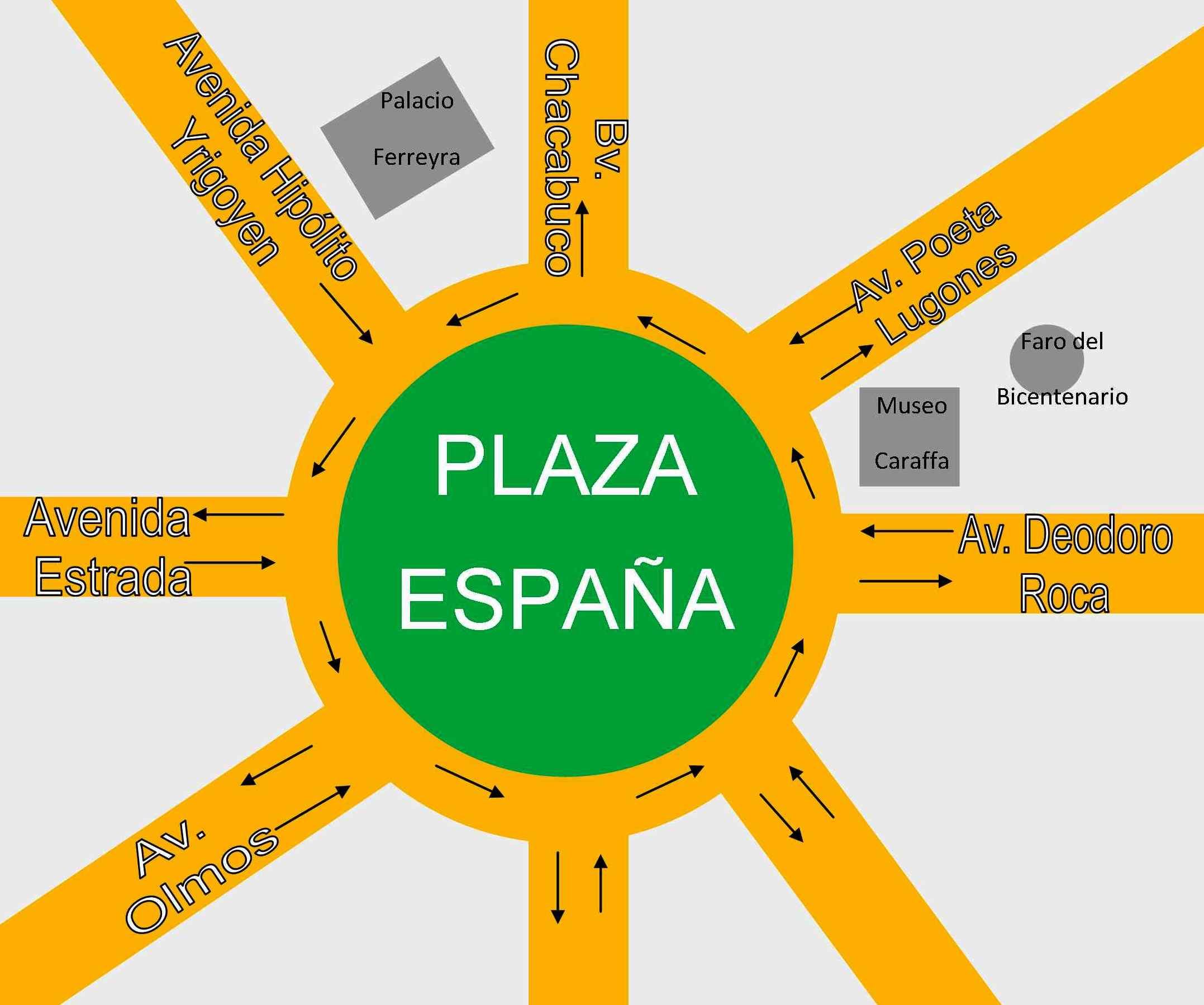 Plaza España. Plano de distribución